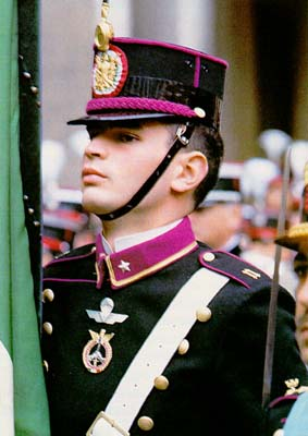 Allievo Ufficiale dell'Esercito